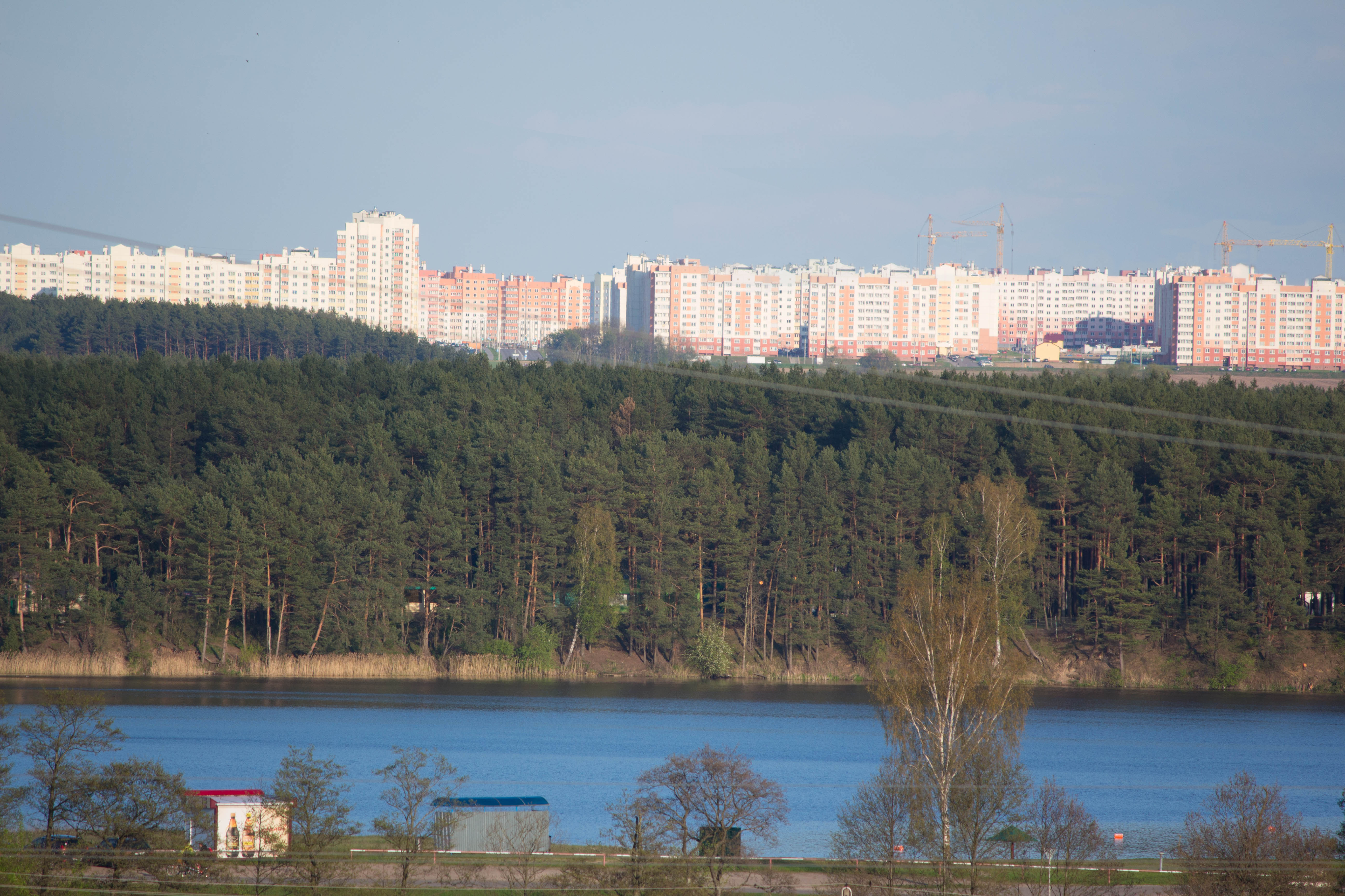 Вид на озеро Юбилейное и микрорайон "Ольшанка". Гродно, 216 год. Фото: Ян Хведчин.